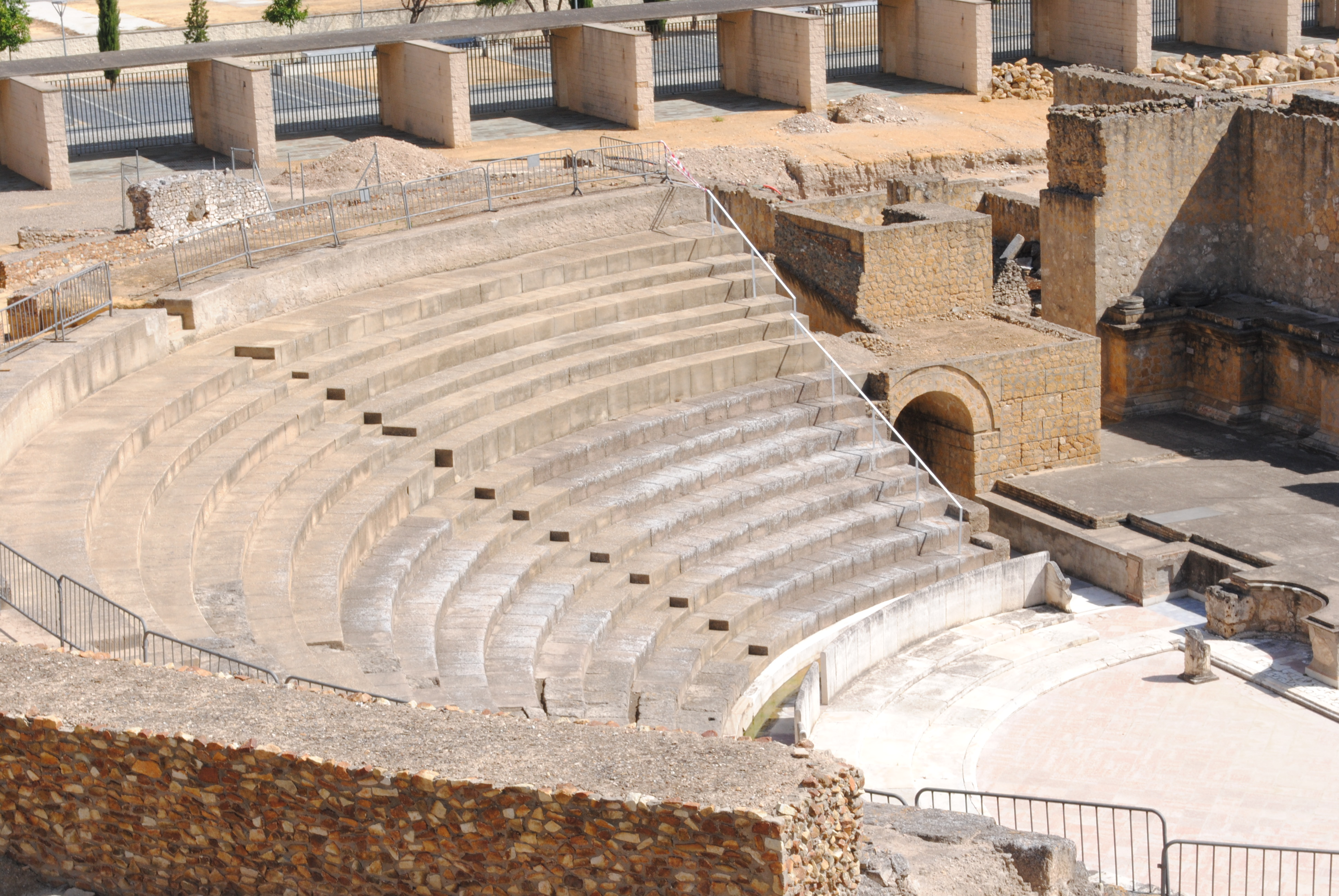 Teatro Romano de Itálica, Santiponce, Sevilla